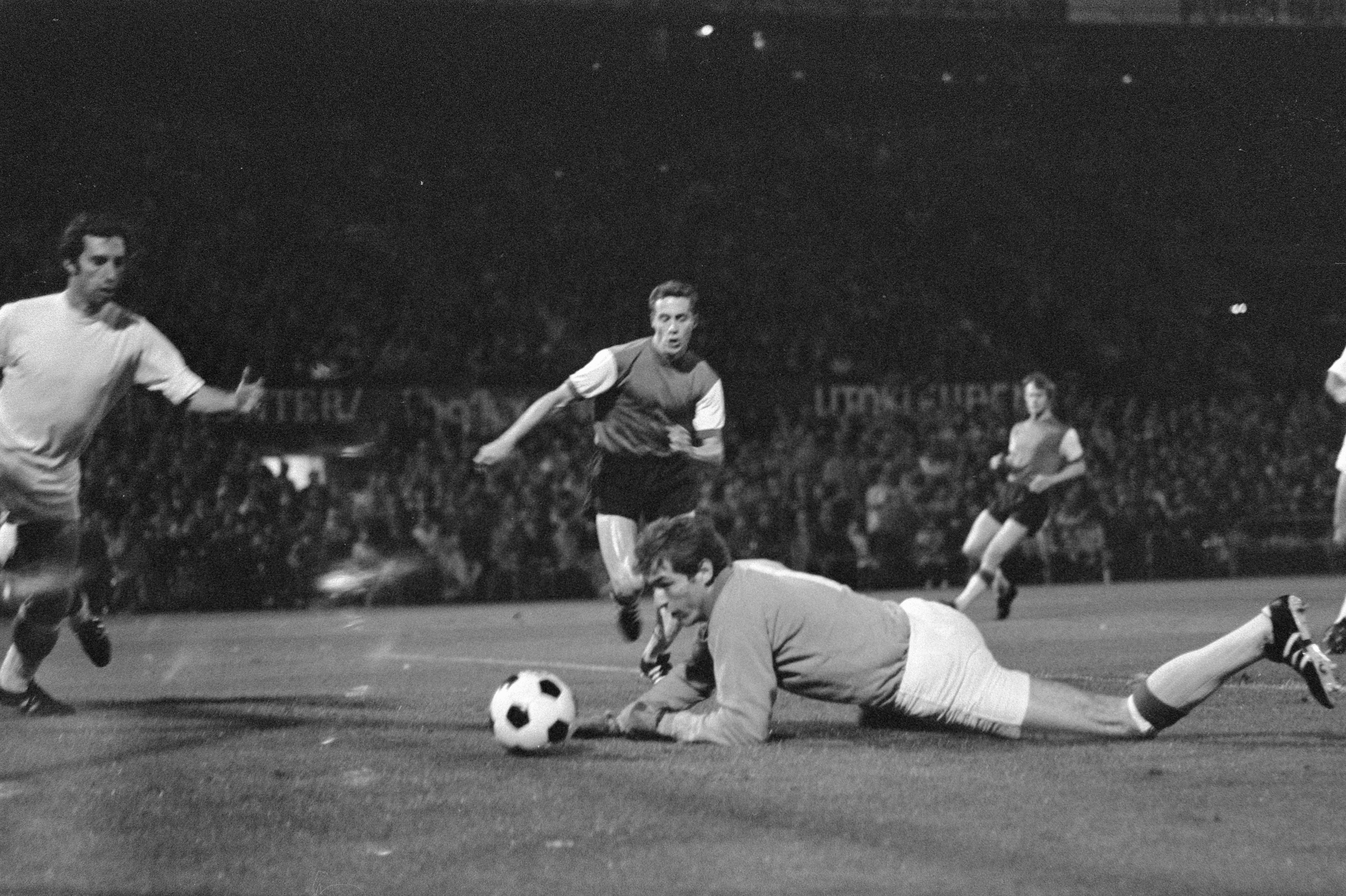 Collectie / Archief : Fotocollectie Anefo Reportage / Serie : Feijenoord tegen Estudiantes 1-0; Feijenoord wint World beker ; Kindvall probeert te schieten, keeper Perzano pakt bal Beschrijving : Feijenoord tegen Estudiantes 1-0; Feijenoord wint World beker; Kindvall probeert te schieten, keeper Perzano pakt bal Datum : 9 september 1970 Trefwoorden : sport, voetbal Persoonsnaam : Kindvall, Ove Instellingsnaam : Feyenoord Fotograaf : Fotograaf Onbekend / Anefo Auteursrechthebbende : Nationaal Archief Materiaalsoort : Negatief (zwart/wit) Nummer archiefinventaris : bekijk toegang 2.24.01.05 Bestanddeelnummer : 923-8309